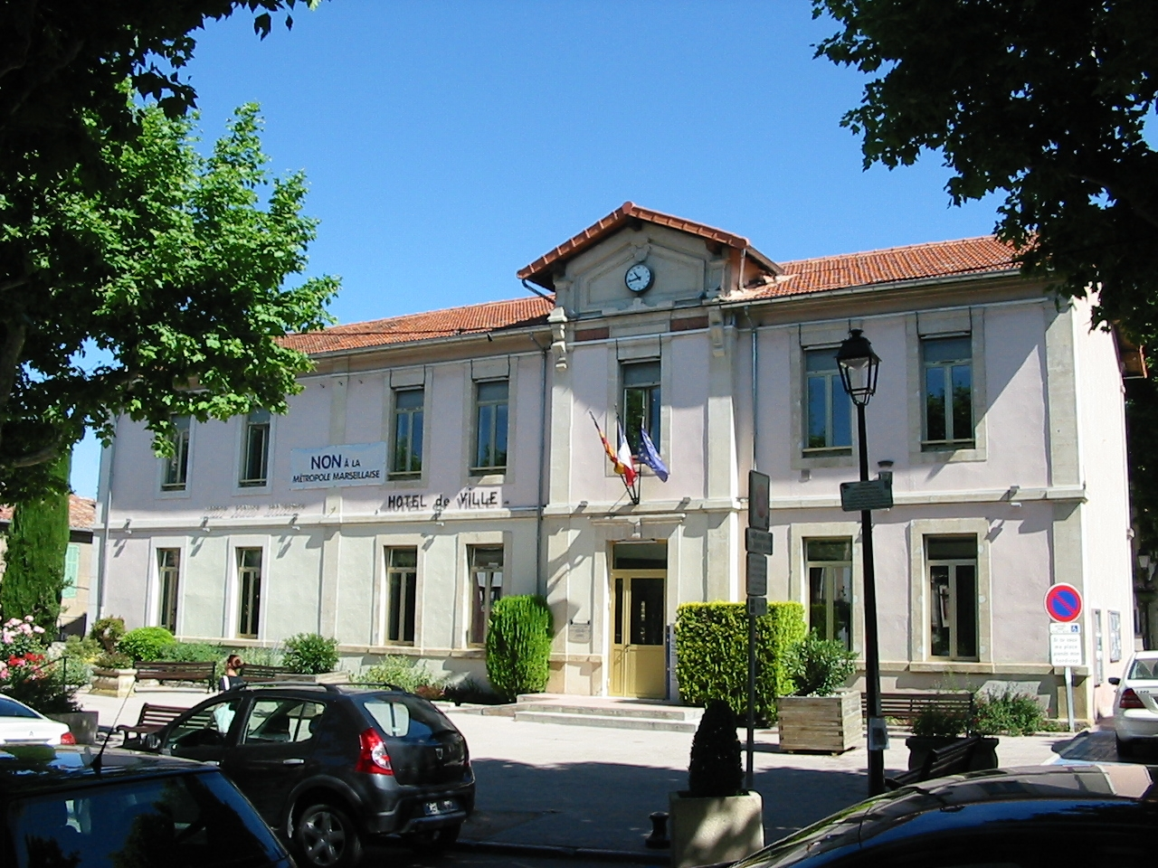 L'Hôtel de ville de Fuveau, commune des Bouches-du-Rhône.